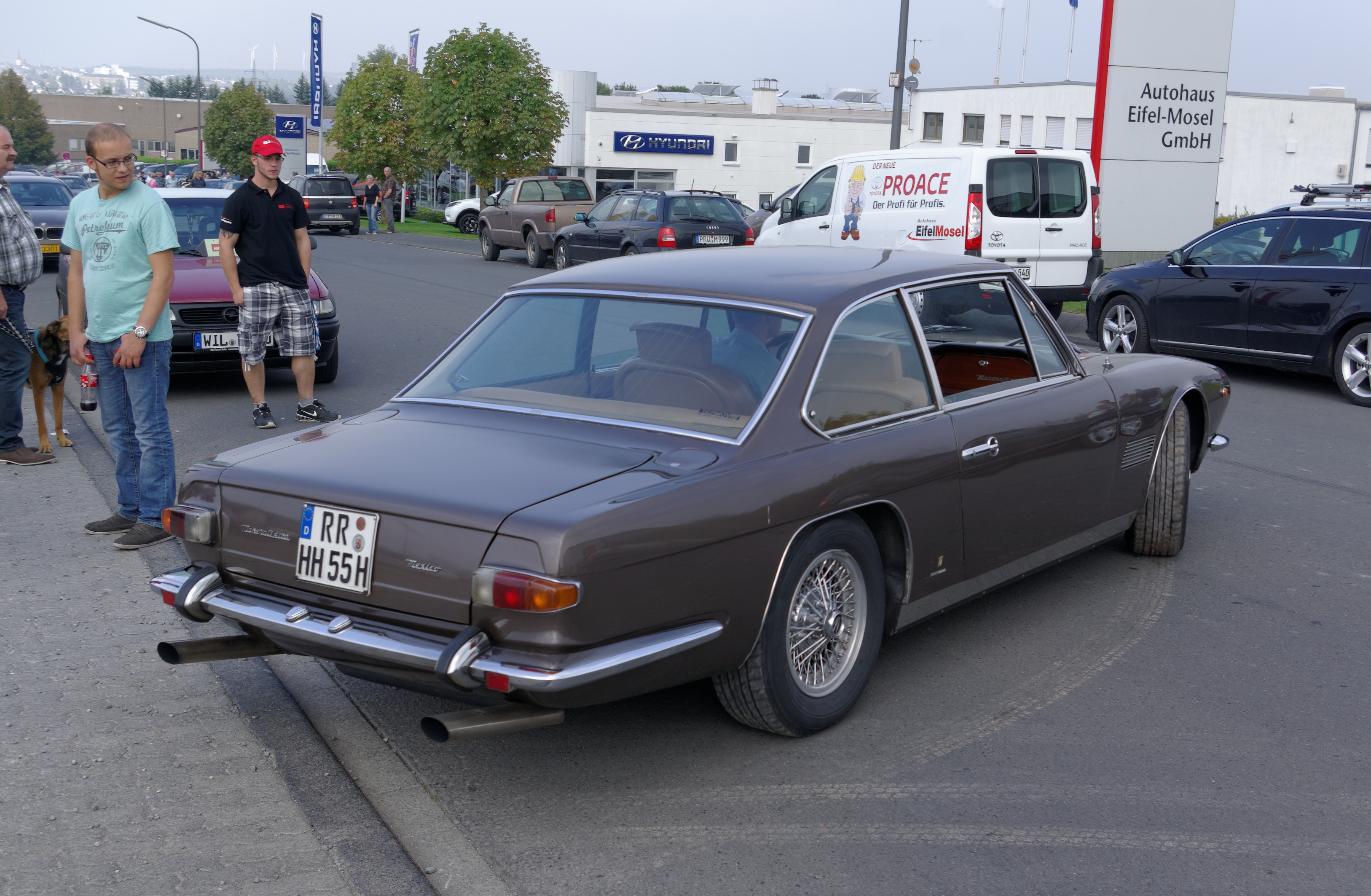 Maserati Mexico, Das Nummernschild ist verfälscht!